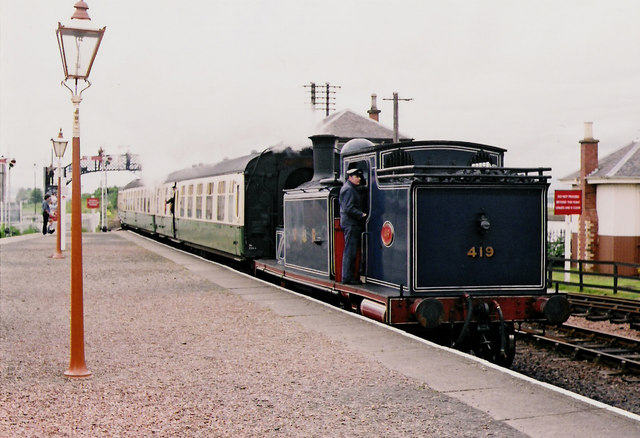 Arrival at Bo'ness